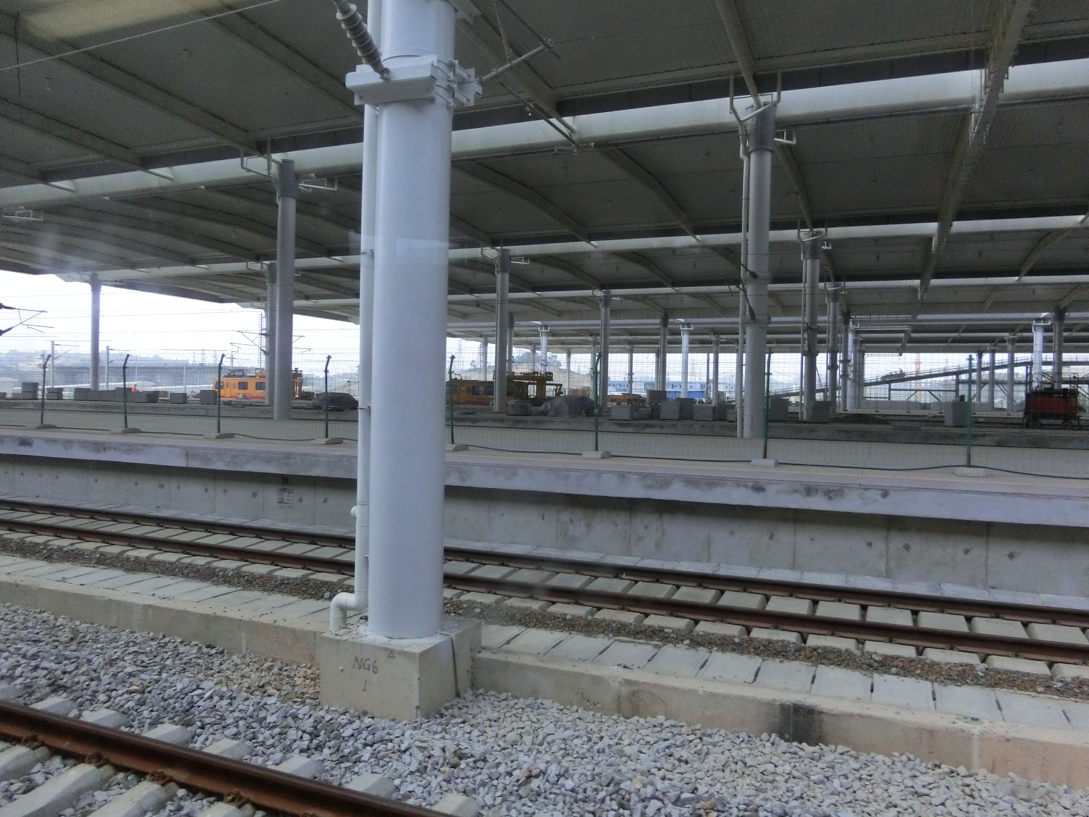 正在建设中的南宁东站内部